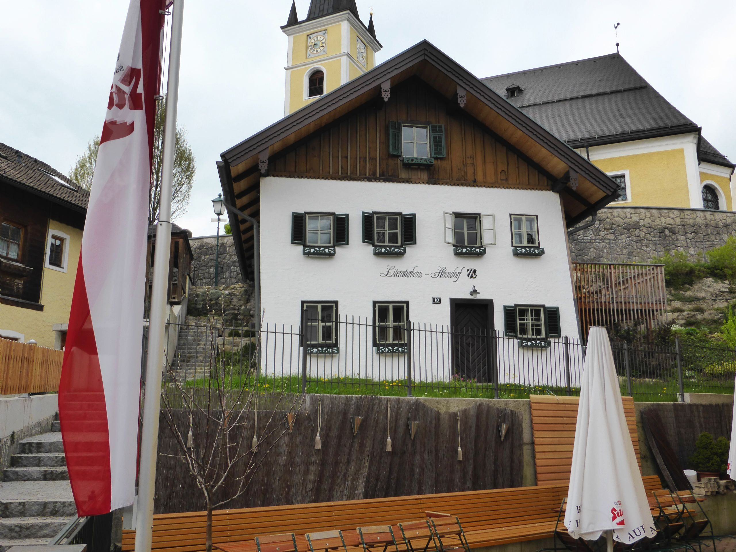 Bürgerhaus, Häusl an der Jägerleiten 82, Freumbichler-Haus